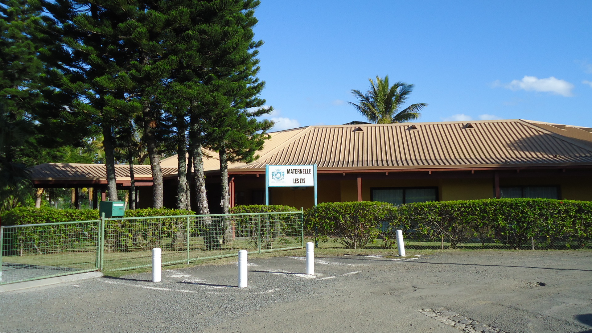 Ecole Les Lys